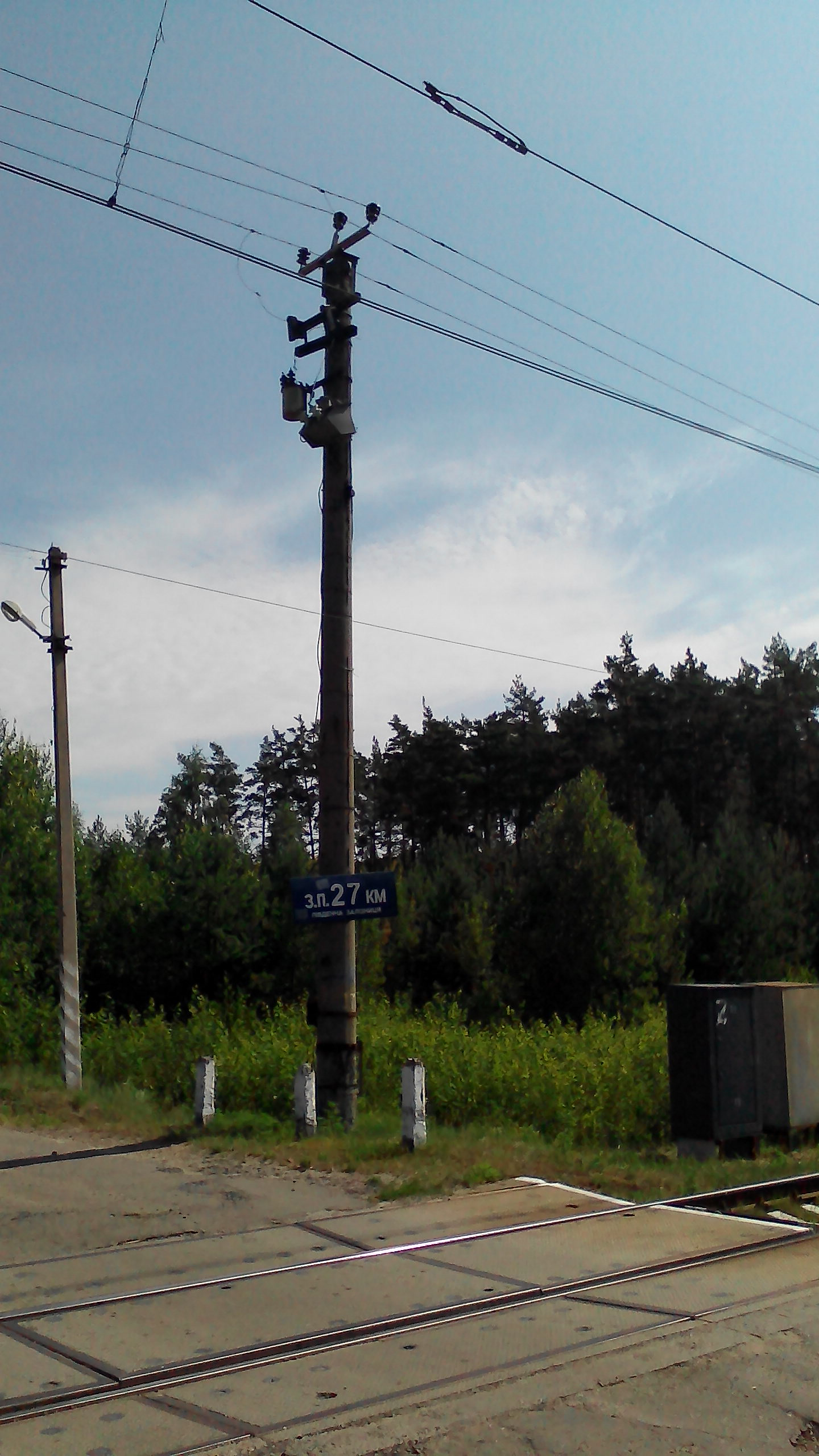 Зупинний пункт 27 км. Україна. Укрзалізниця. Південна залізниця. Ділянка Мерефа-Зміїв